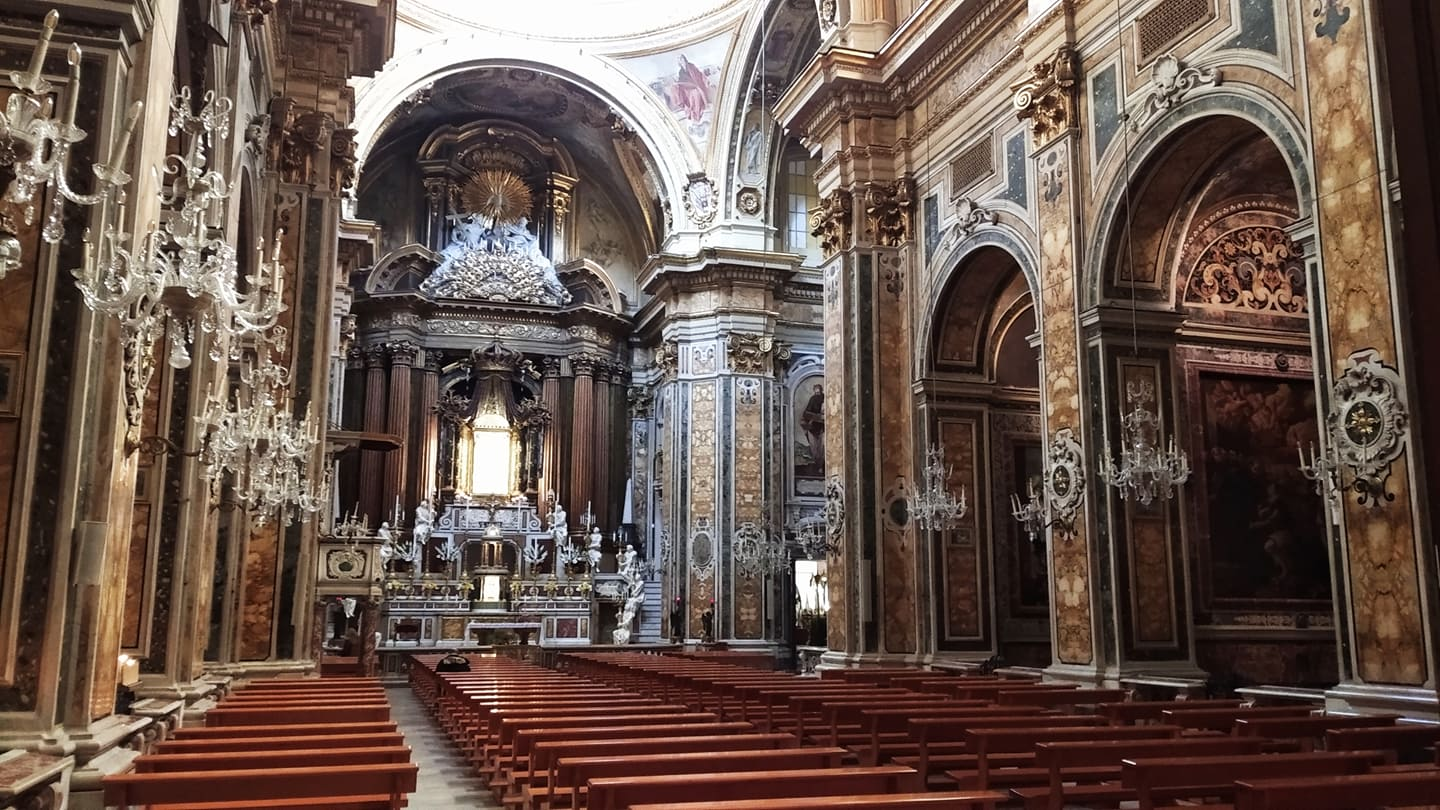 Interno Gesù Vecchio